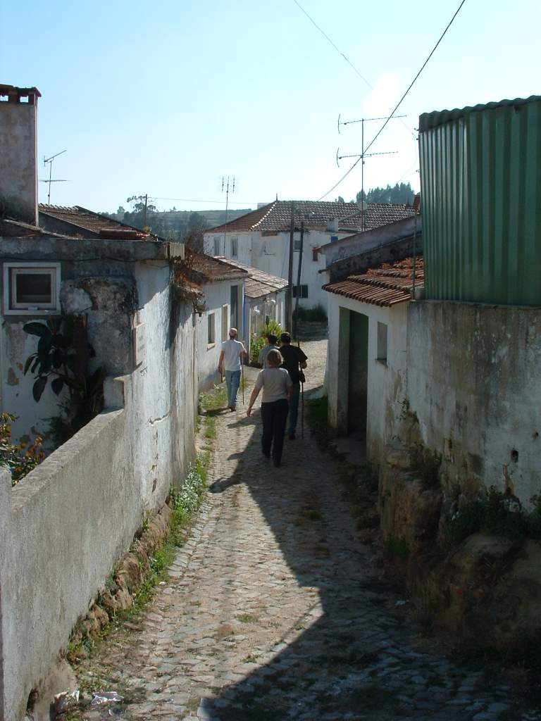 Uma das ruas mais antigas do Rogel, em Julho de 2003